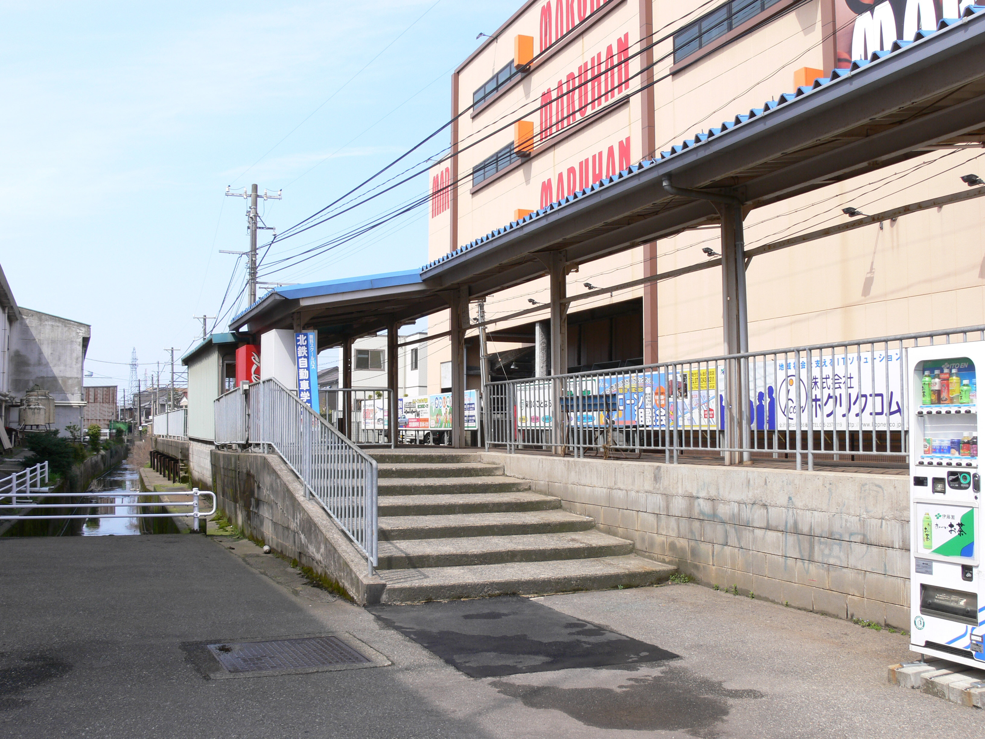 西泉駅